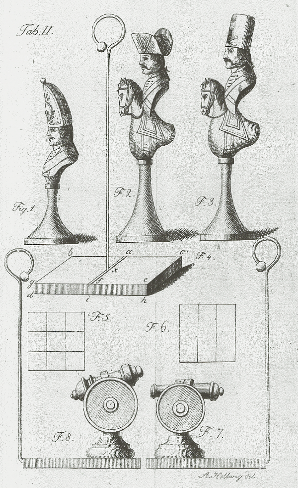 Ilustrazione di miniature contenute nel manuale del wargame Das Kriegsspiel : ein Versuch die Wahrheit verschiedener Regeln der Kriegskunst in einem unterhaltenden Spiel anschaulich zu machen di Johann Christian Ludwig Hellwig (1803)